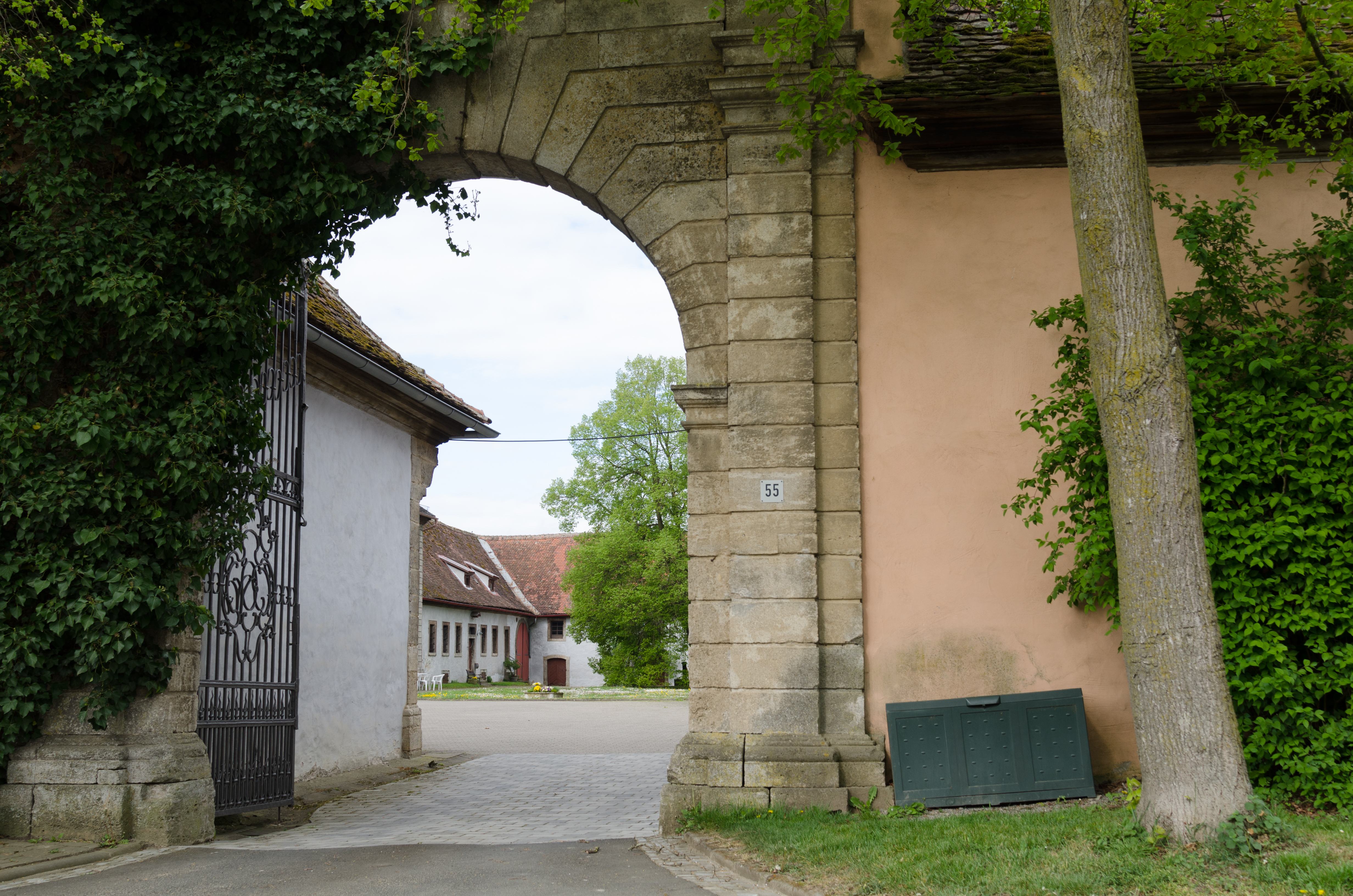 Simmershofen, Hohlach 55: ehemaliger Rittersitz